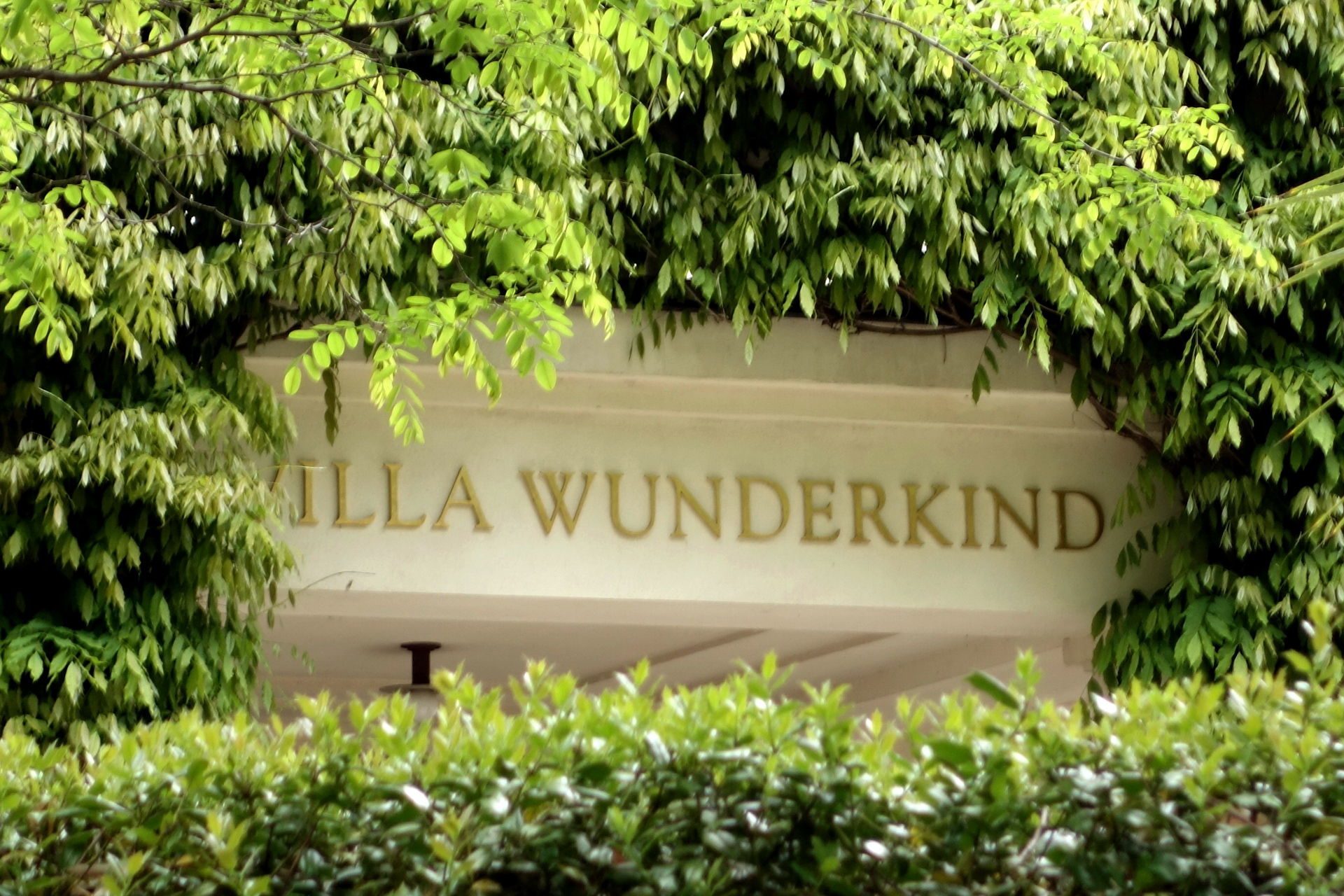 Namenszug der Villa Wunderkind, Seestraße 35-37 in Potsdam